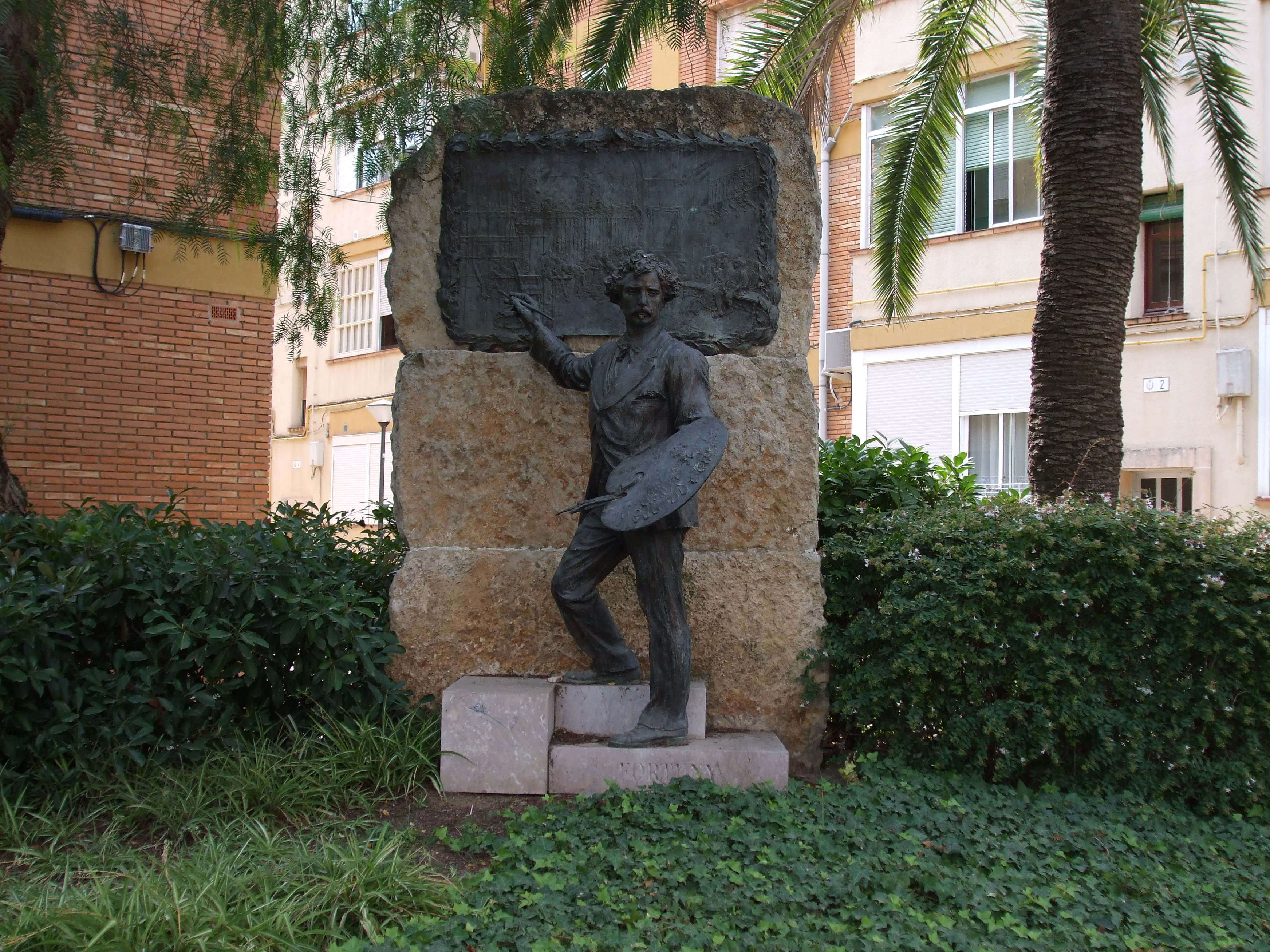 Monumento al pintor Marià Fortuny en el Barrio que lleva su nombre (Reus, España)